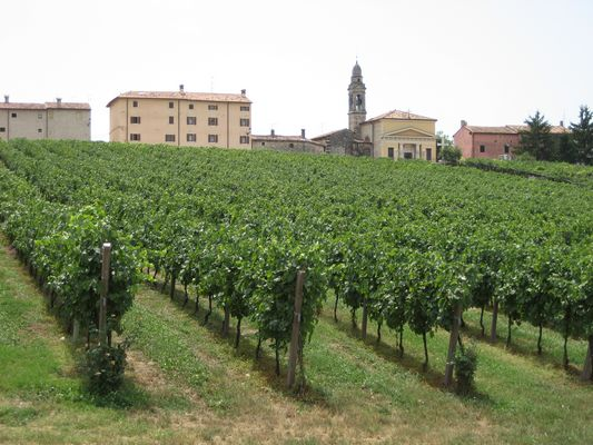 Zelf gemaakte foto